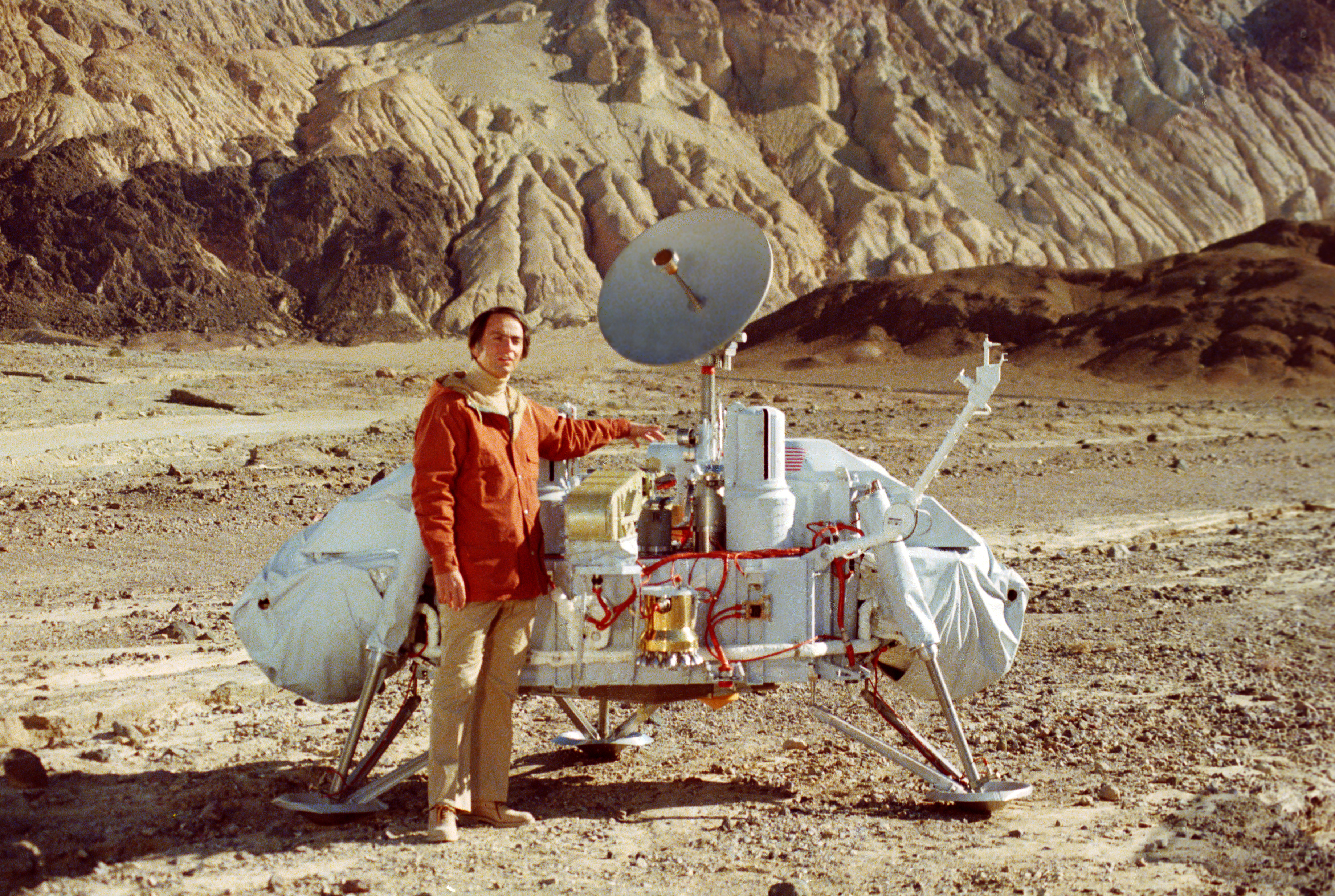 Карл Саган у модели спускаемого аппарата "Викинг"